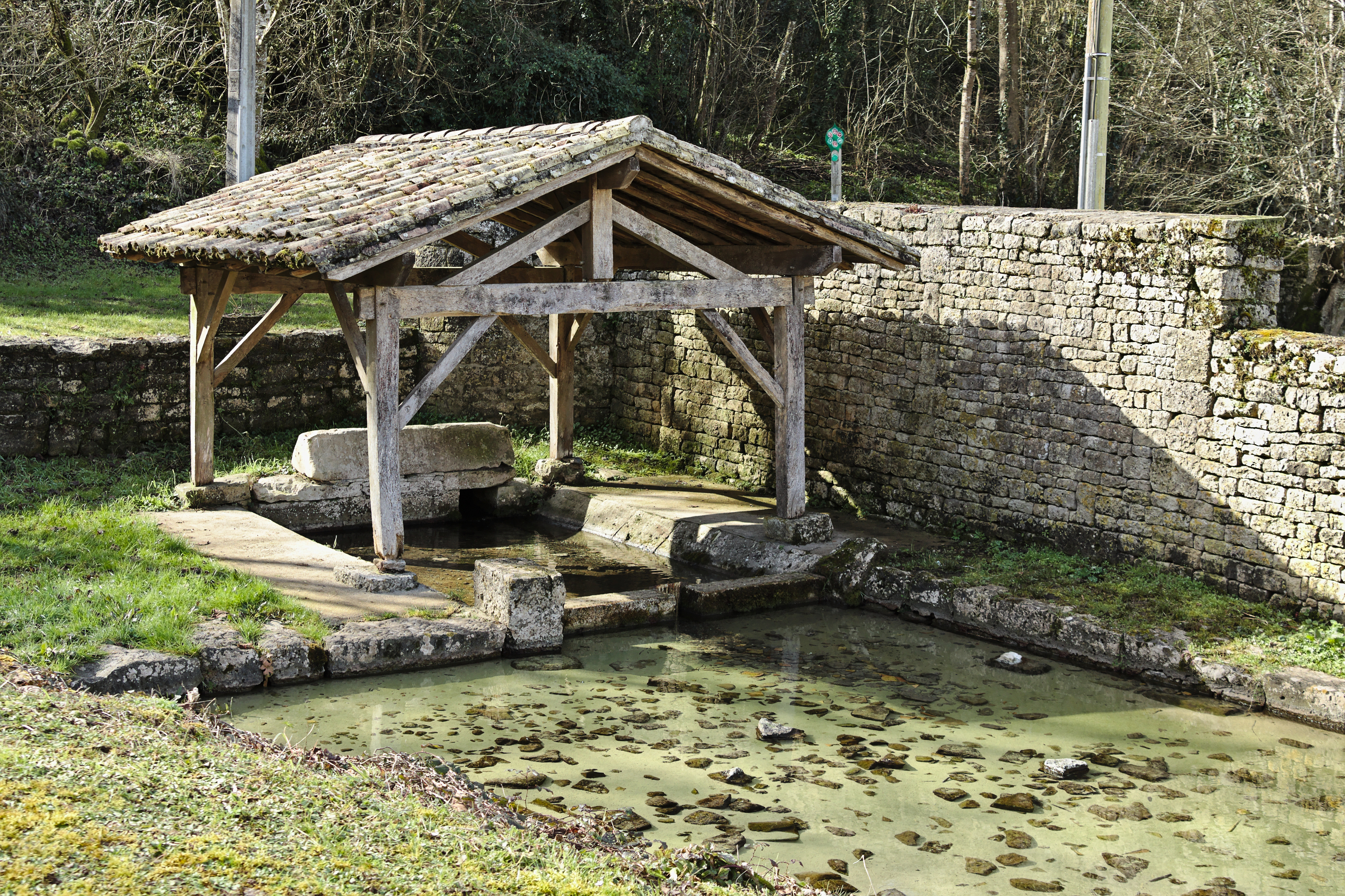 Lavoir de la Cure, La Cure, Mazières-sur-Béronne, Deux-Sèvres, Poitou-Charentes, France